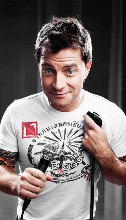 Patrick Groulx - Humoriste, animateur et musicien québécois